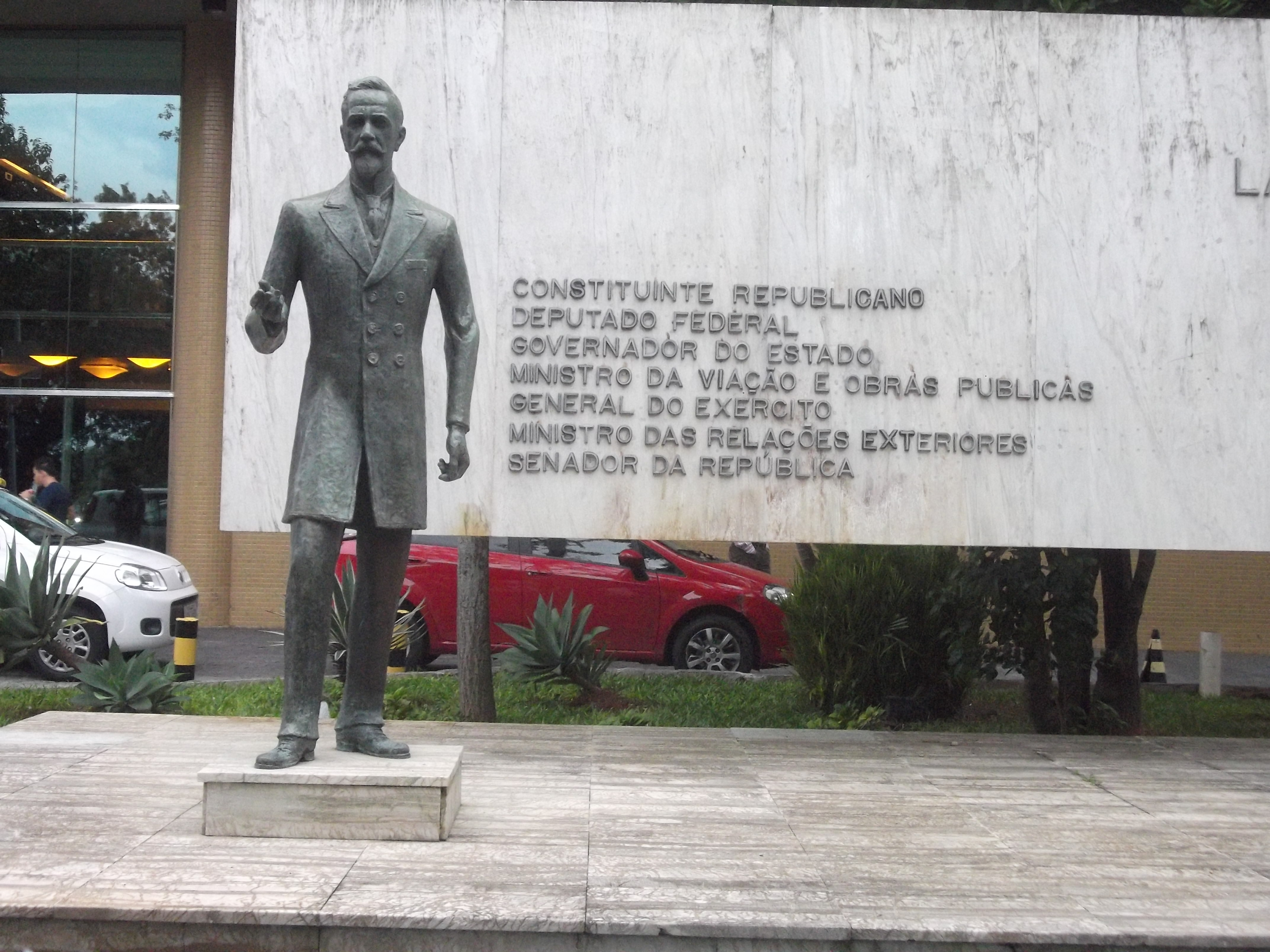 Praça Lauro Müller, Florianópolis, Brasil